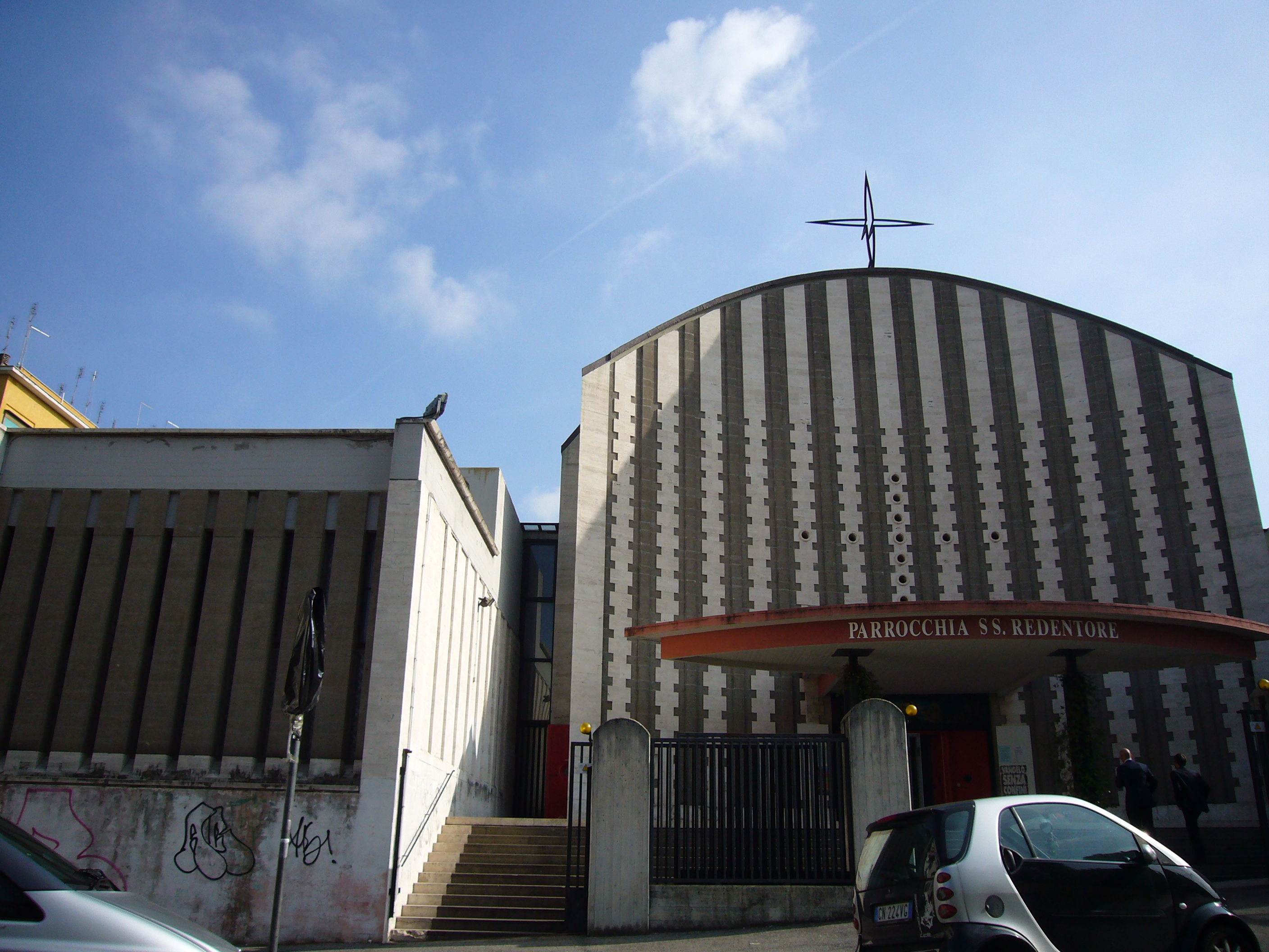 Roma, chiesa del SS Redentore a Val Melaina (quartiere Monte Sacro)